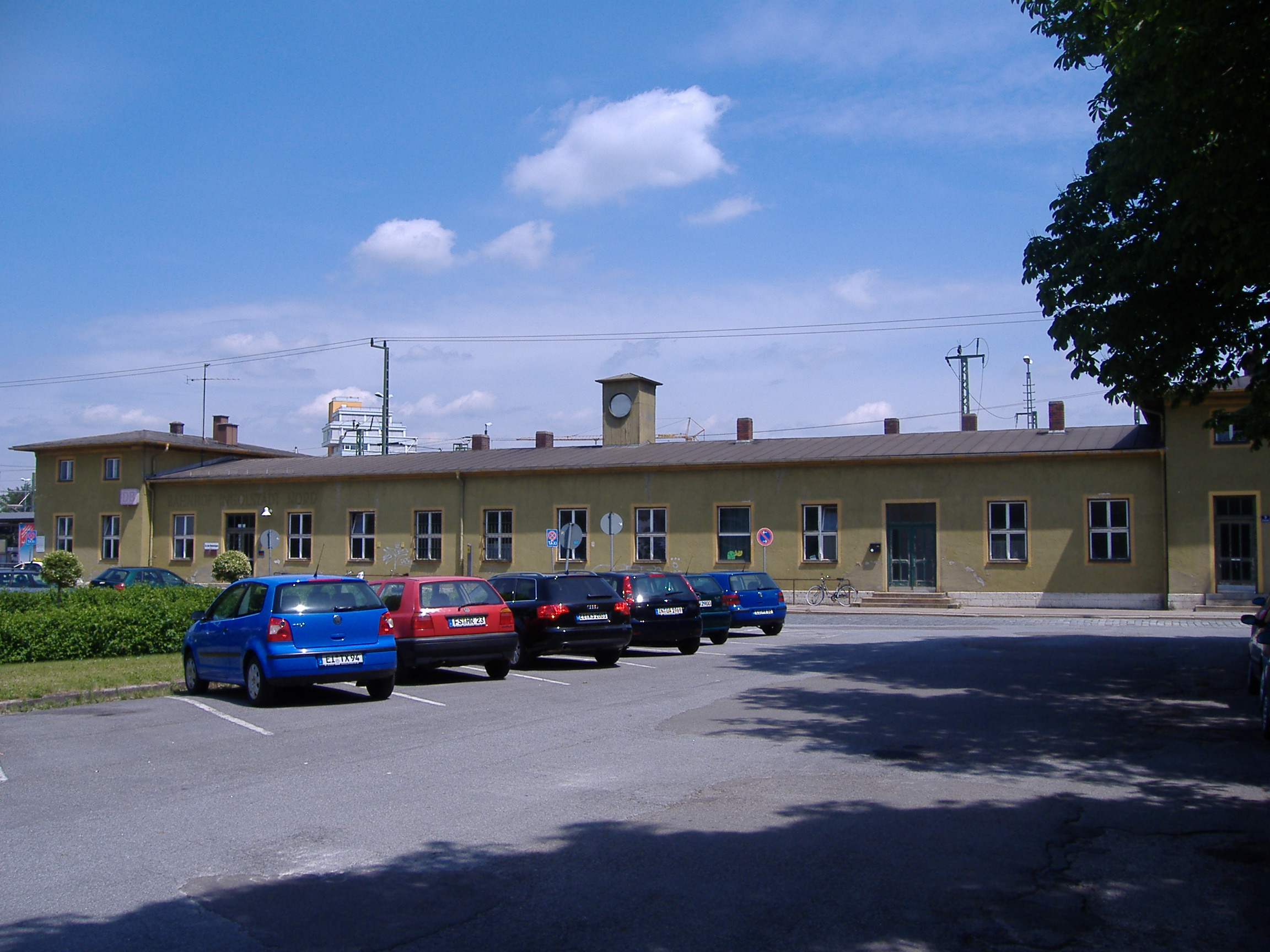 Hauptgebäude Bahnhof Ingolstadt Nord